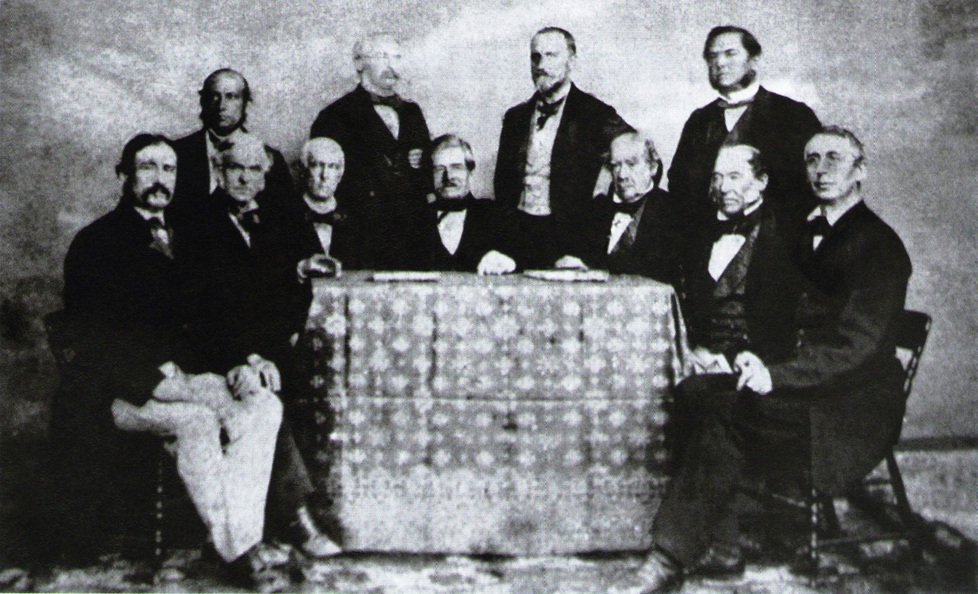 Los Ministros de Castilla junto con el Presidente de la Republica del Perú Ramón Castilla